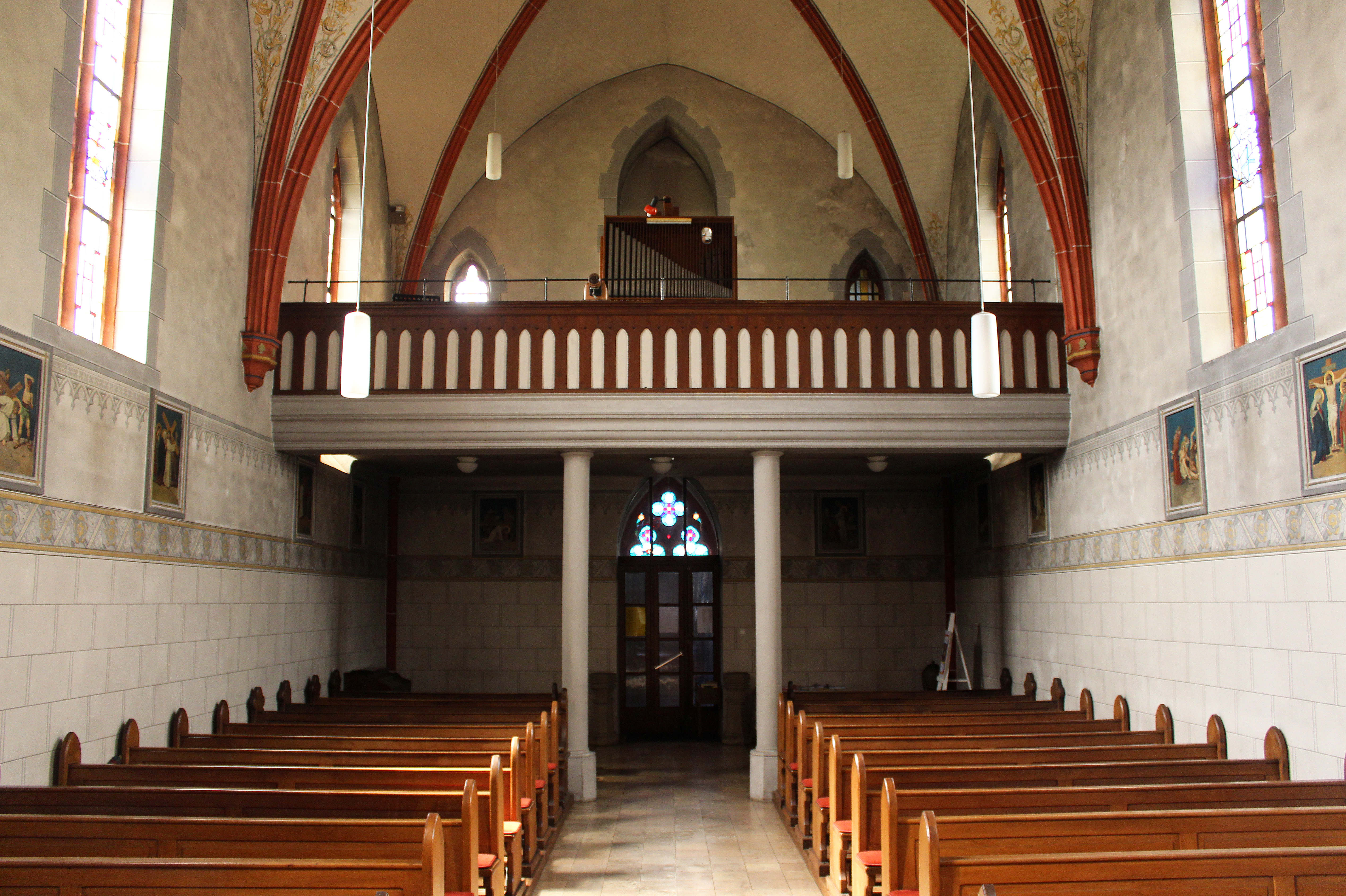 Blick ins Innere der katholischen Kirche St. Margareta in Eimersdorf, Gemeinde Rehlingen-Siersburg, Landkreis Saarlouis, Saarland